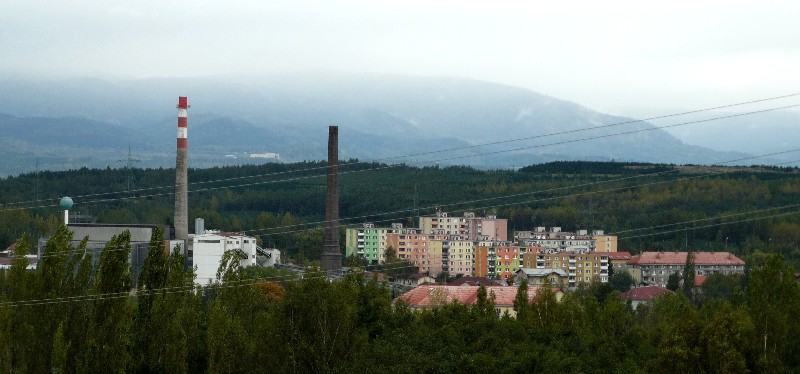 Obec Nové Sedlo, okres Sokolov, ČESKO